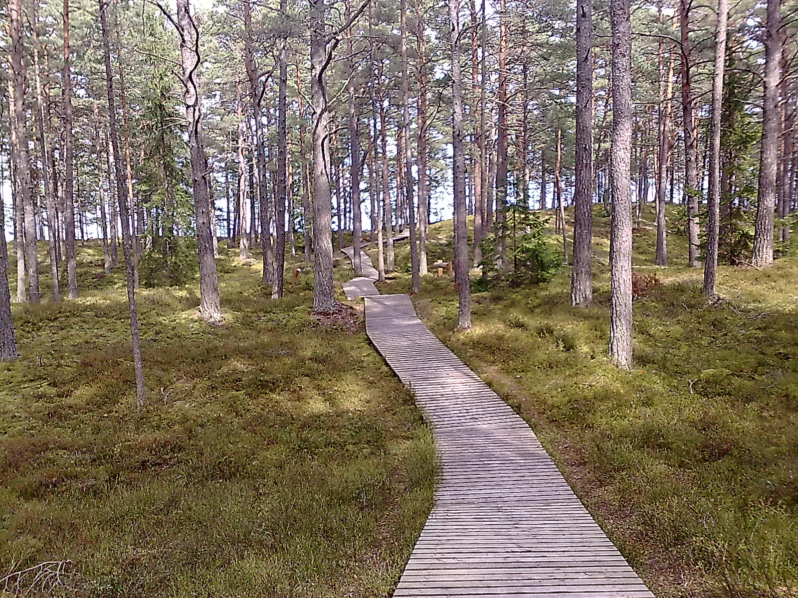 Lačupītes taka I.Medņa dendrologijas parkā